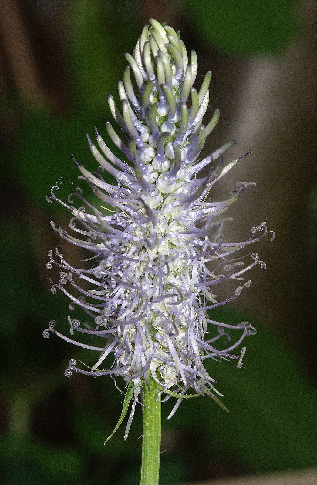 Phyteuma × adulterinum, Schwäbisch-Fränkische Waldberge, Germany